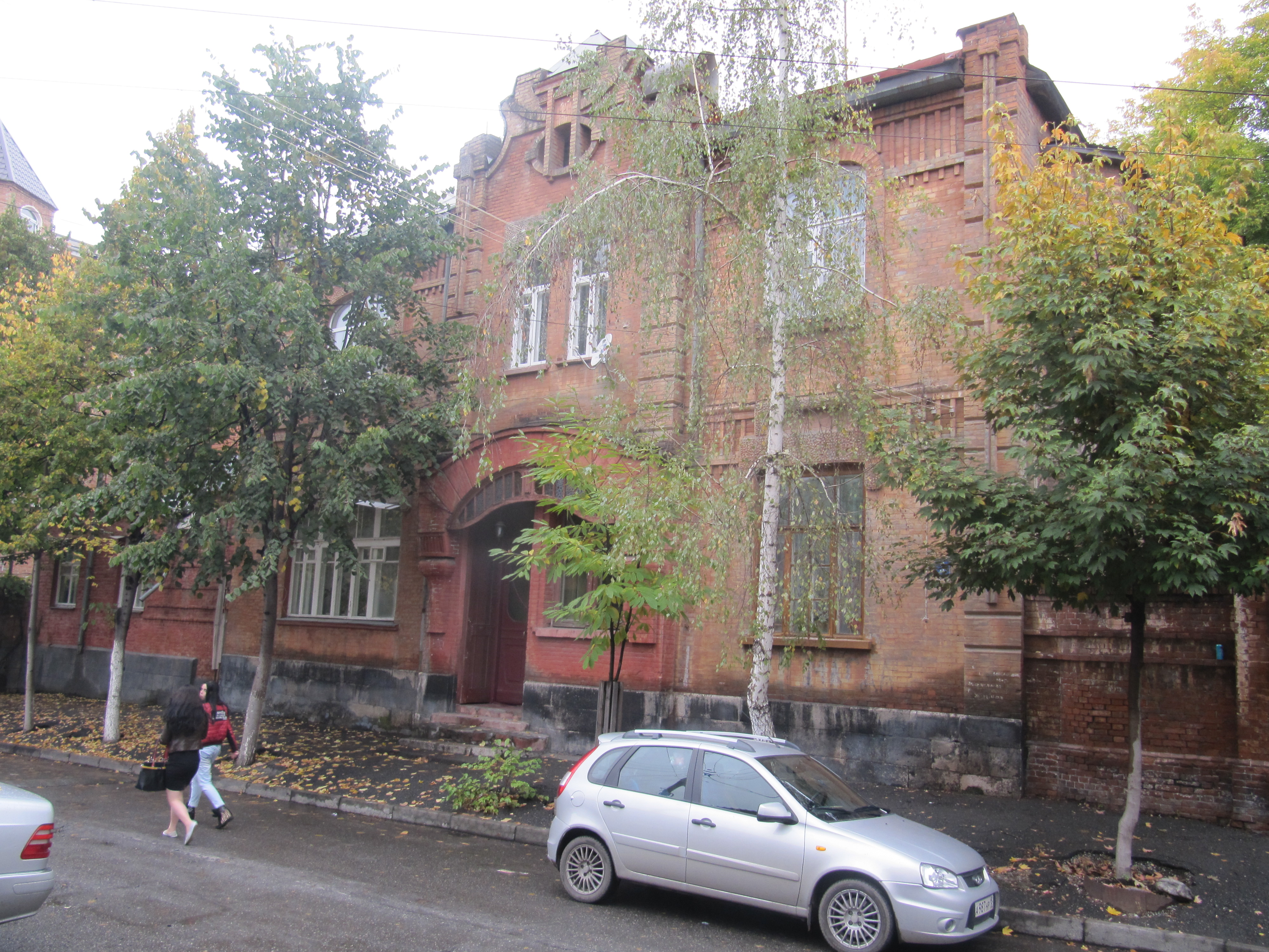 Дом № 5, Павловсккий переулок, Владикавказ